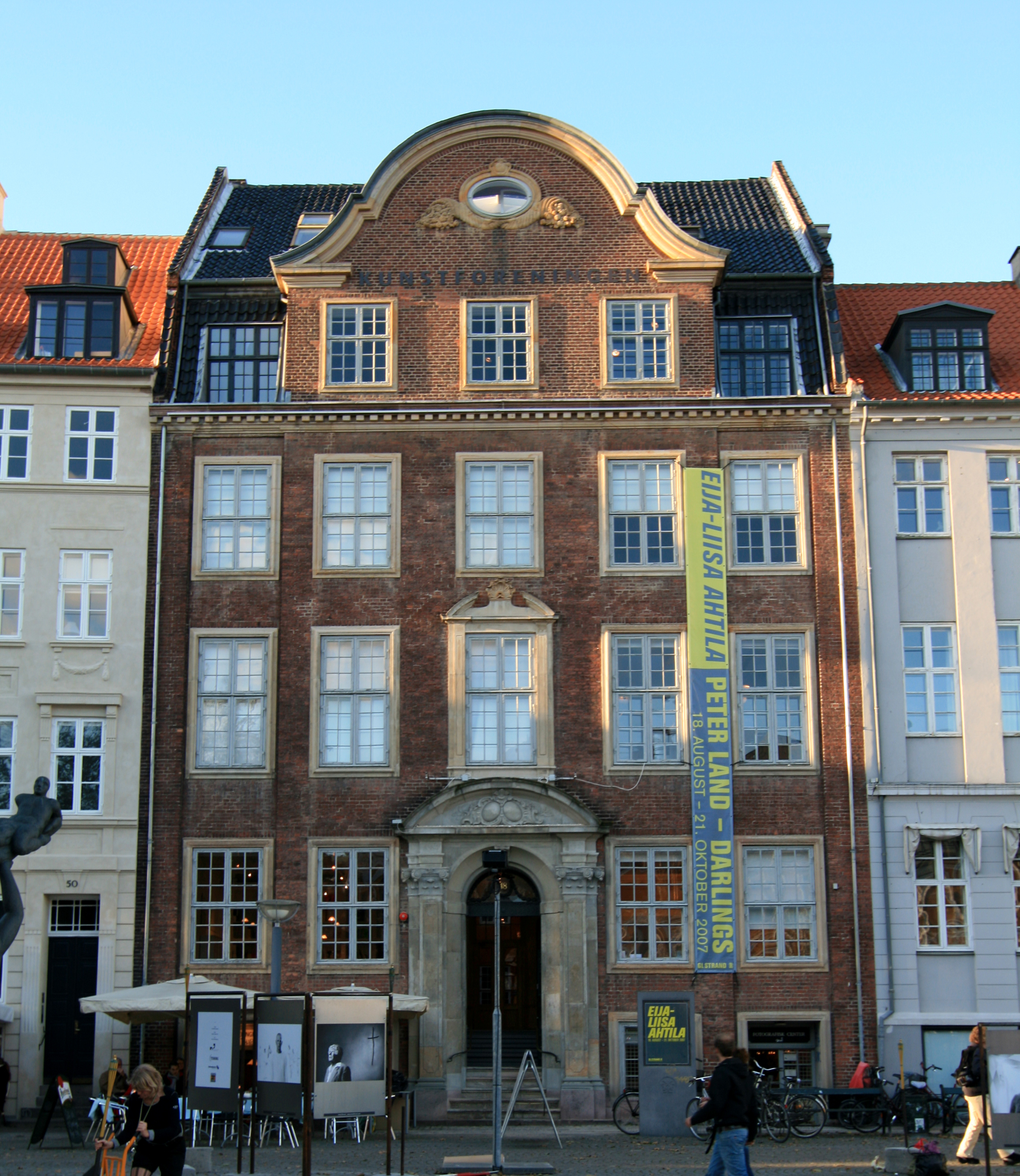 Kunstforeningen GL STRAND, Gammel Strand 48, København. Fredet bygning fra 1750.